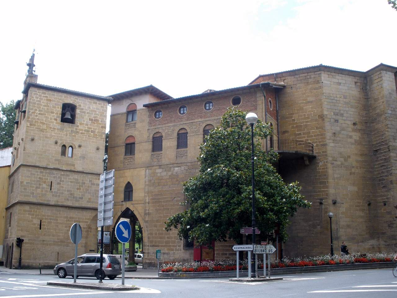 Zarauz - Iglesia de Santa María la Real